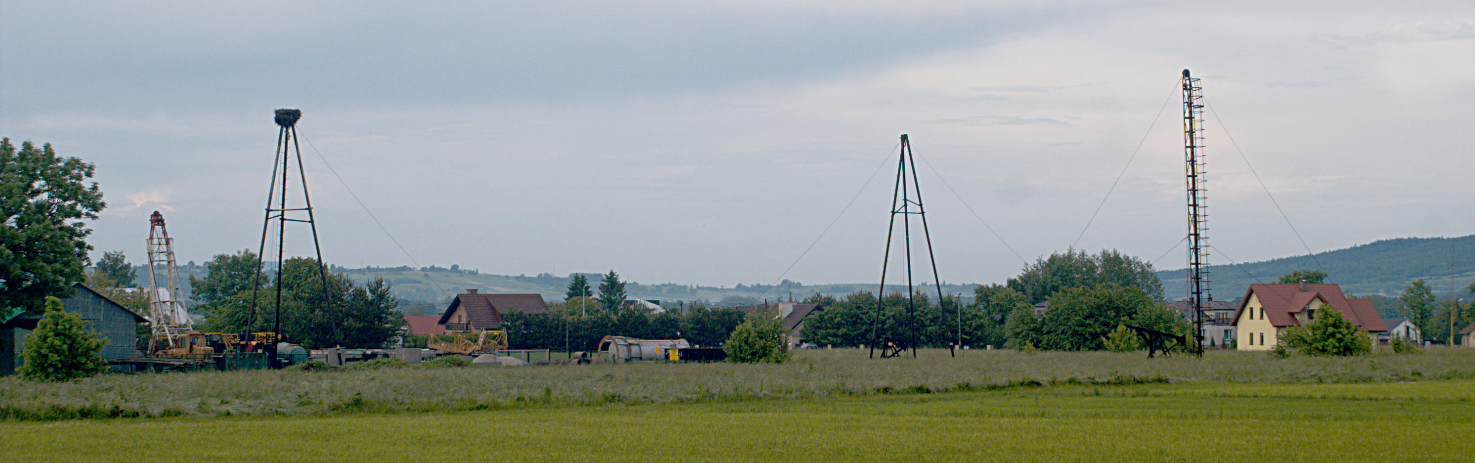 Kopalnia w Krygu.